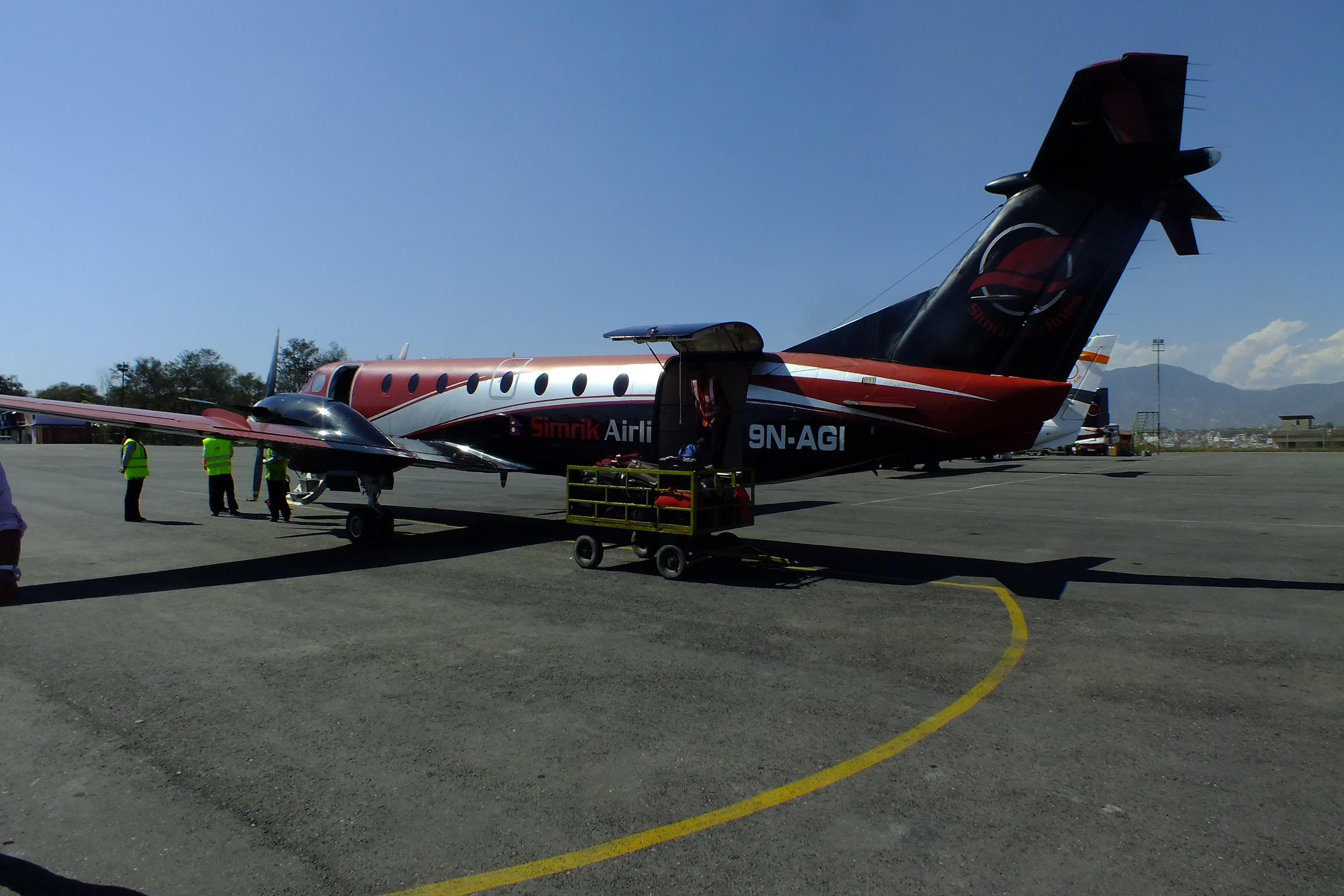 2015-03-17 Beechcraft 1900C Simrik Airlines,Tribhuvan International Airport 9N-AGI (aircraft) トリブバン国際空港